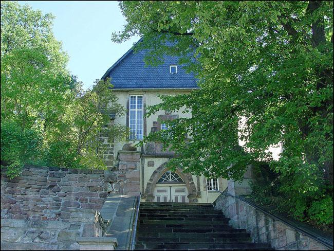 Stadtkirche "Sankt Salvator" in Stadtroda